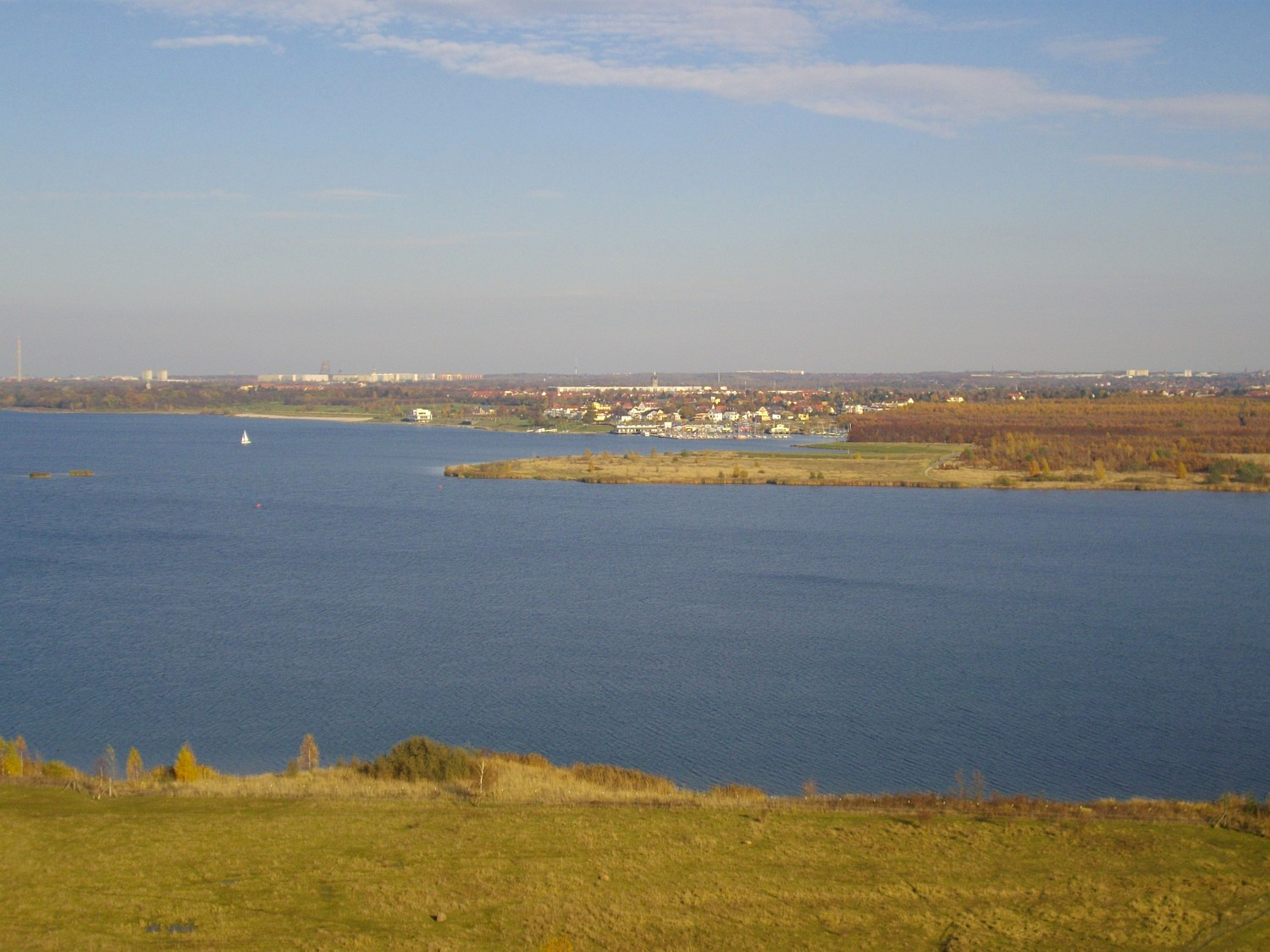 Blick vom Aussichtsturm Bistumshöhe auf Gemarkung Zwenkau über den Cospudener See, Richtung Hafen Zöbigker, Markkleeberg und Leipzig